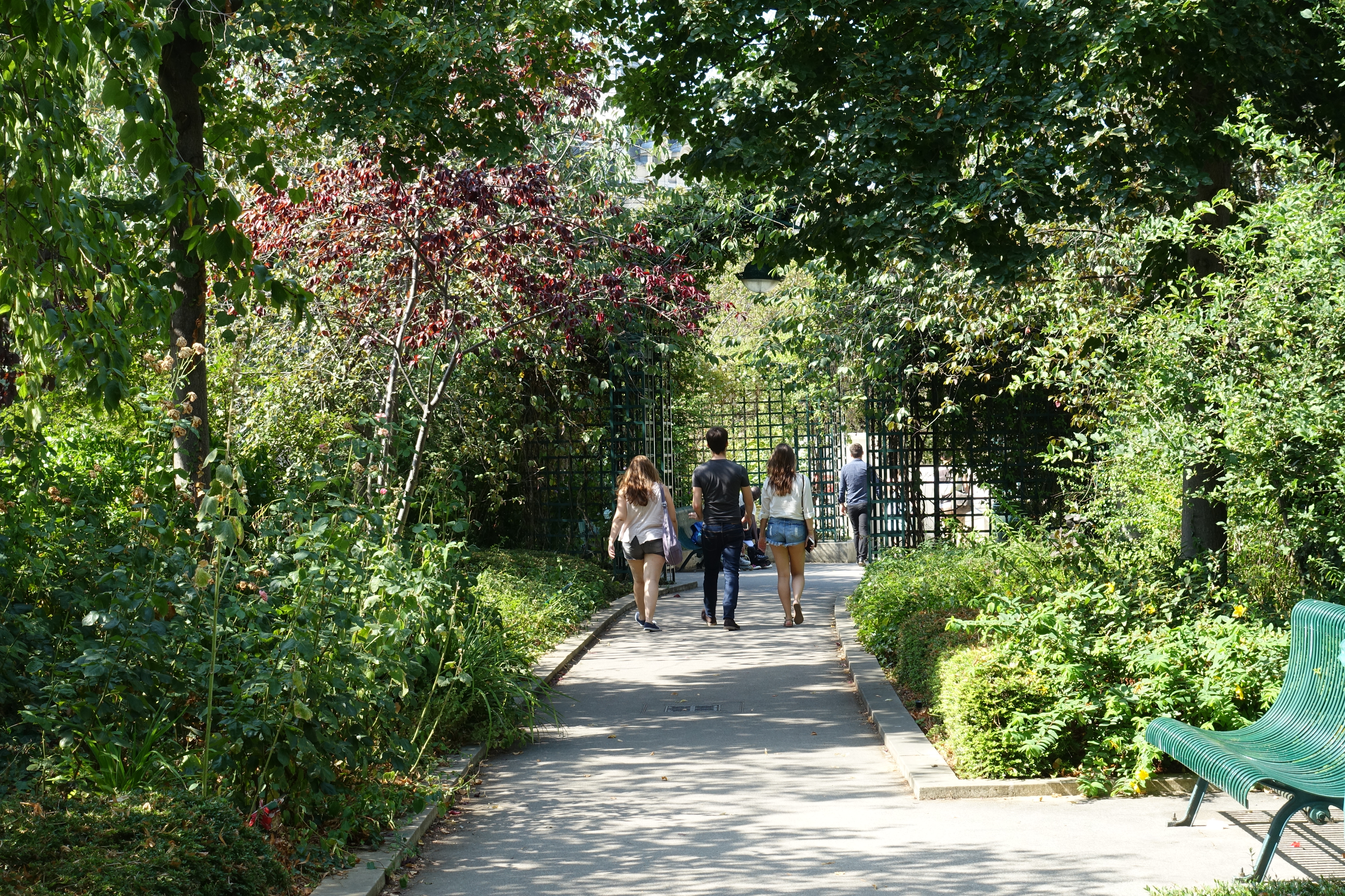 Coulée Verte René-Dumont @ Paris